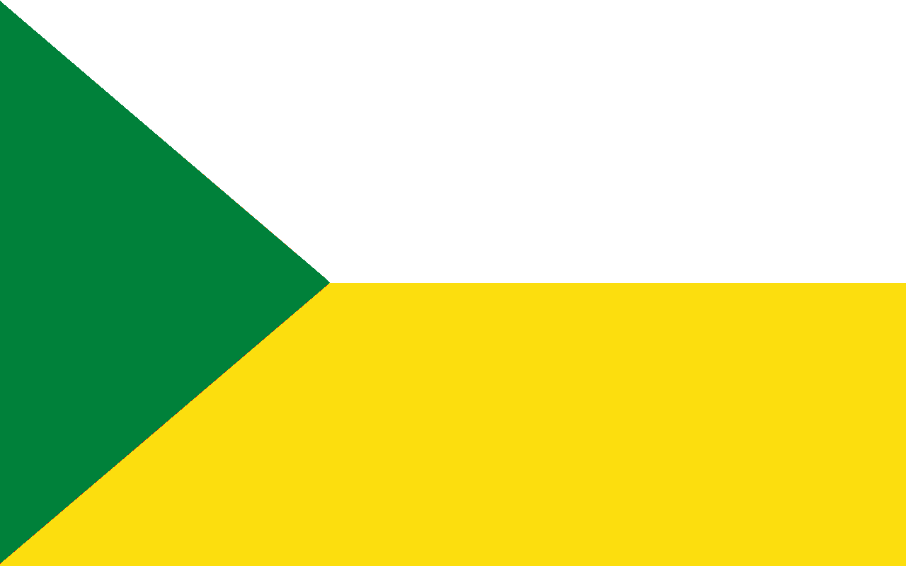 Bandera de Penipe